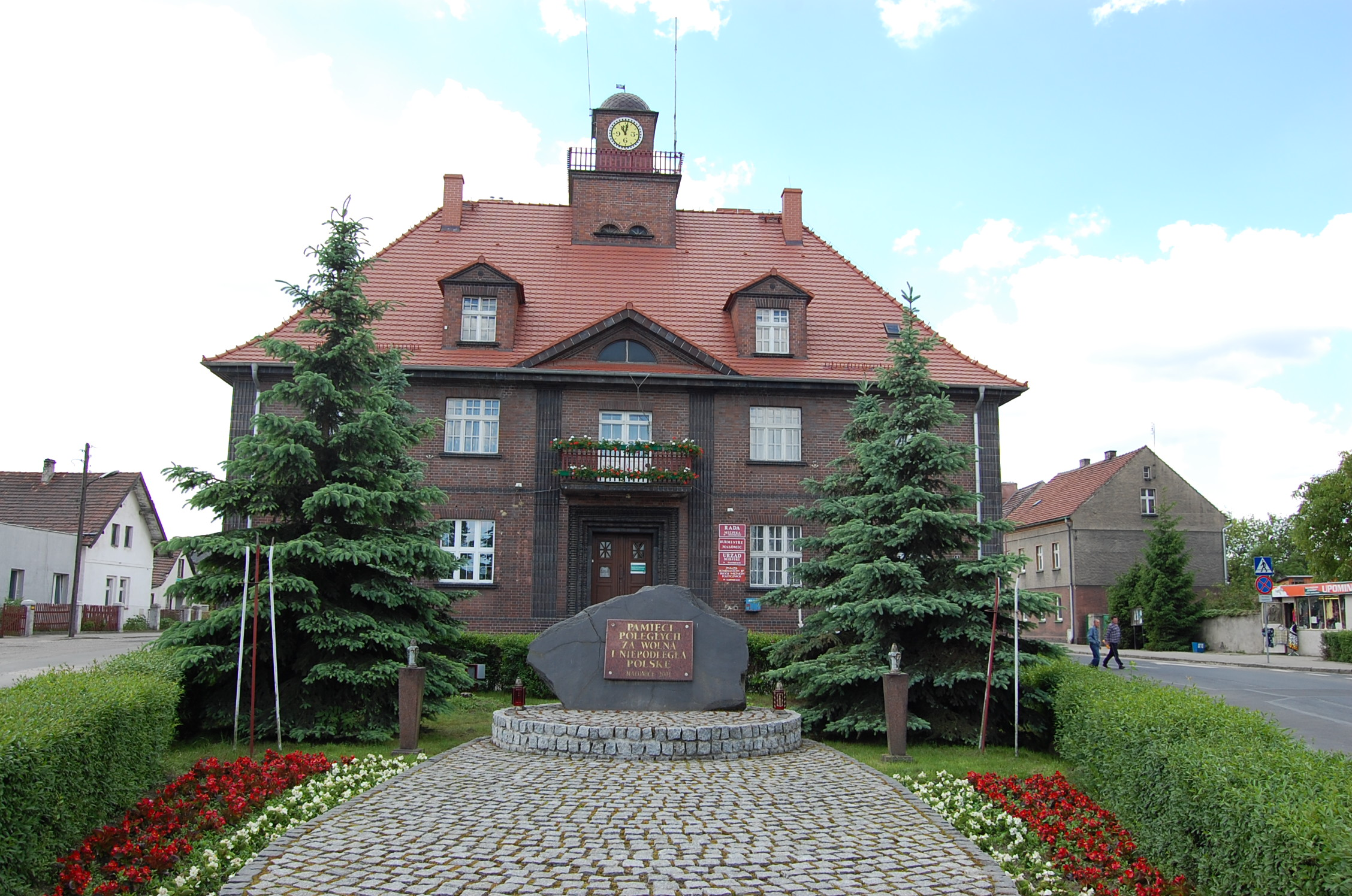 Widok na pomnik nieznanego żołnierza wraz z widokiem na ratusz w Małomicach